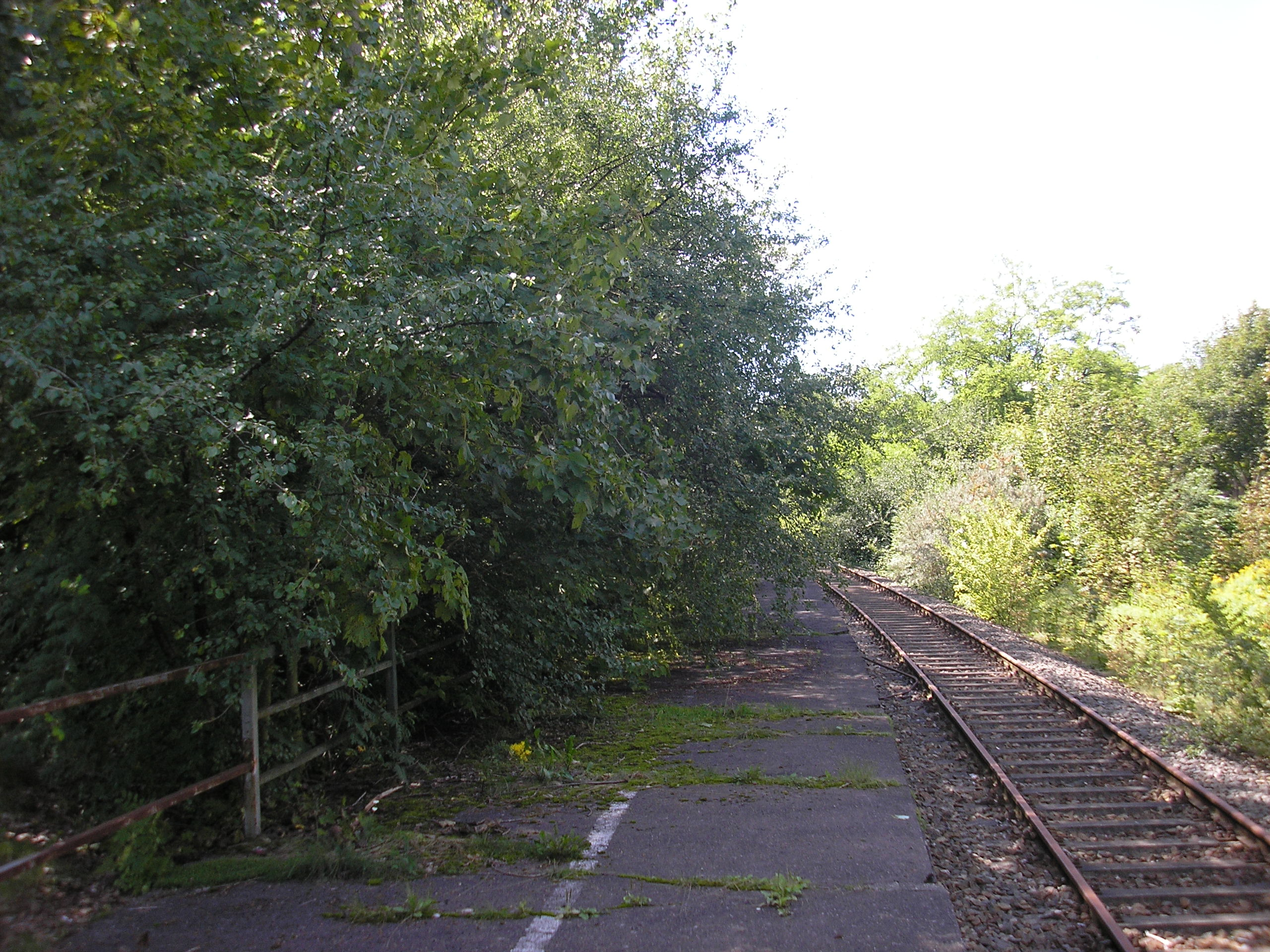 Der Bahnsteig des Bahnhofs Berliner Straße an der stillgelegten S-Bahnstrecke in Erfurt-Nord.